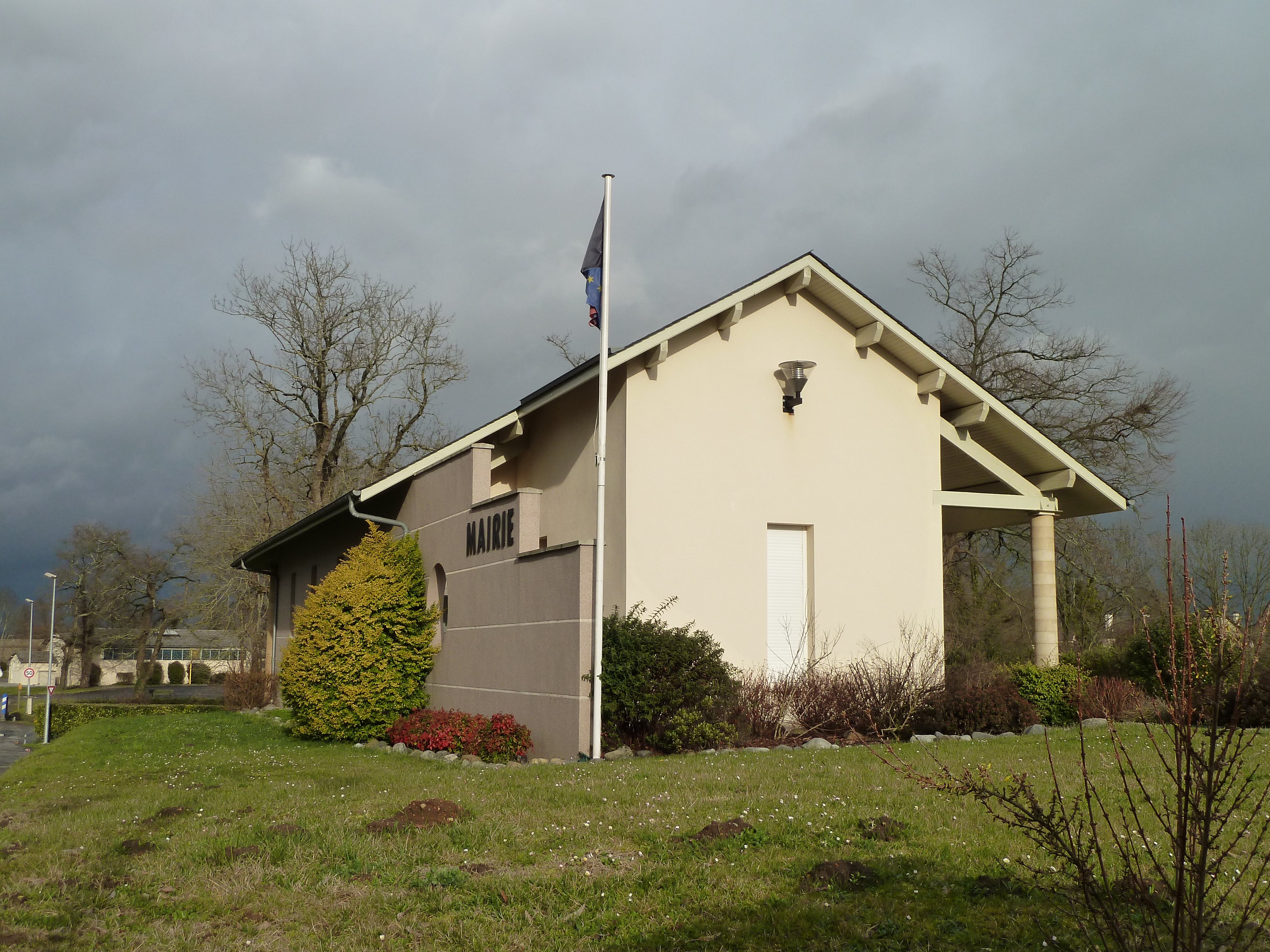 Mairie de Limendous